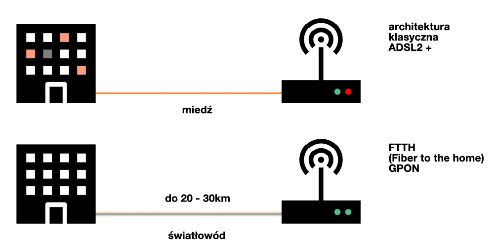 Grafika przedstawia różnice między infrastrukturą FTTH a ADSL